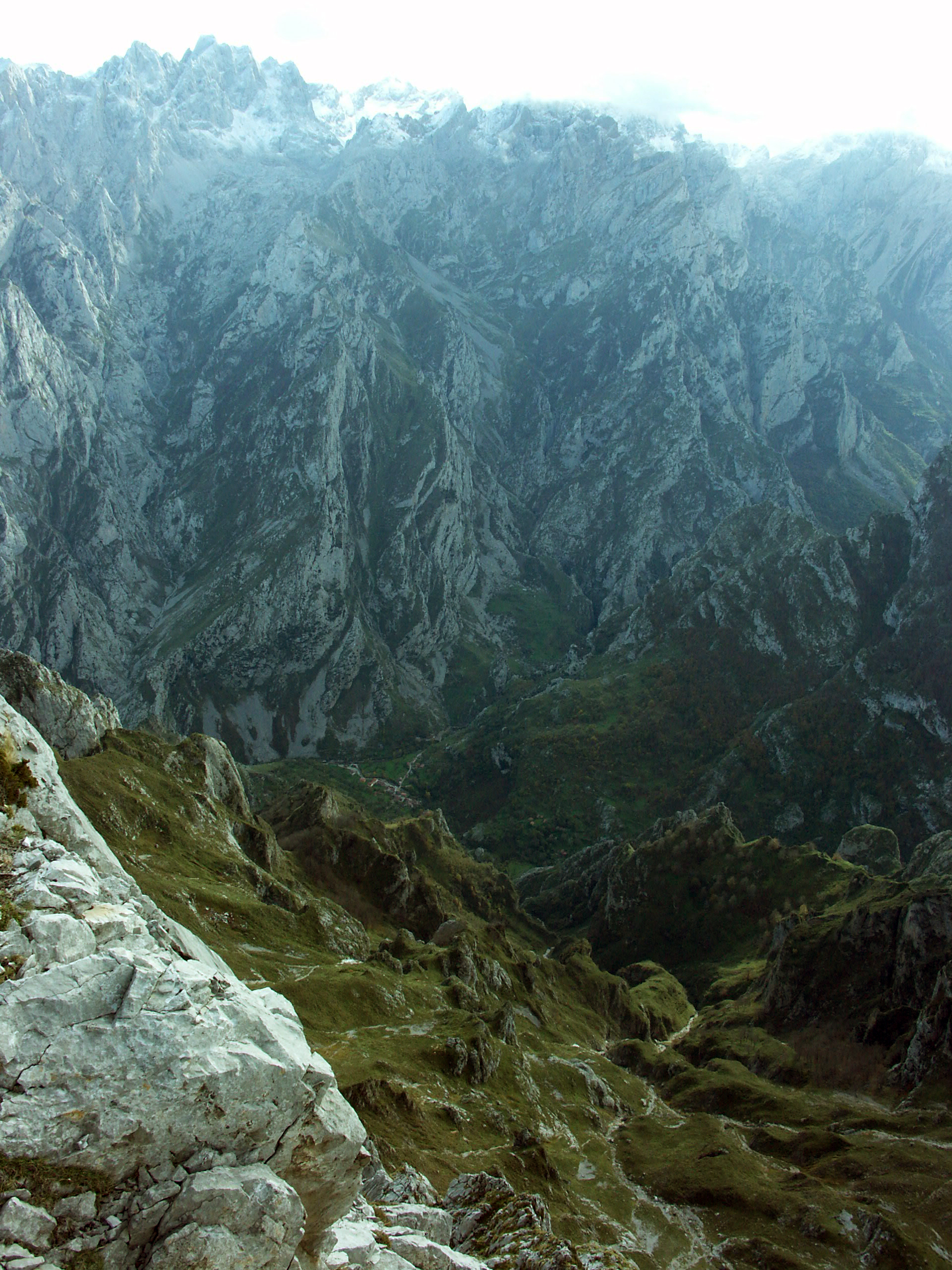 Vue sur le minuscule village de Caín au pied du Torrecerrado, depuis le Cuvicente. Le dénivelé entre le sommet et Caín est de 2200m.